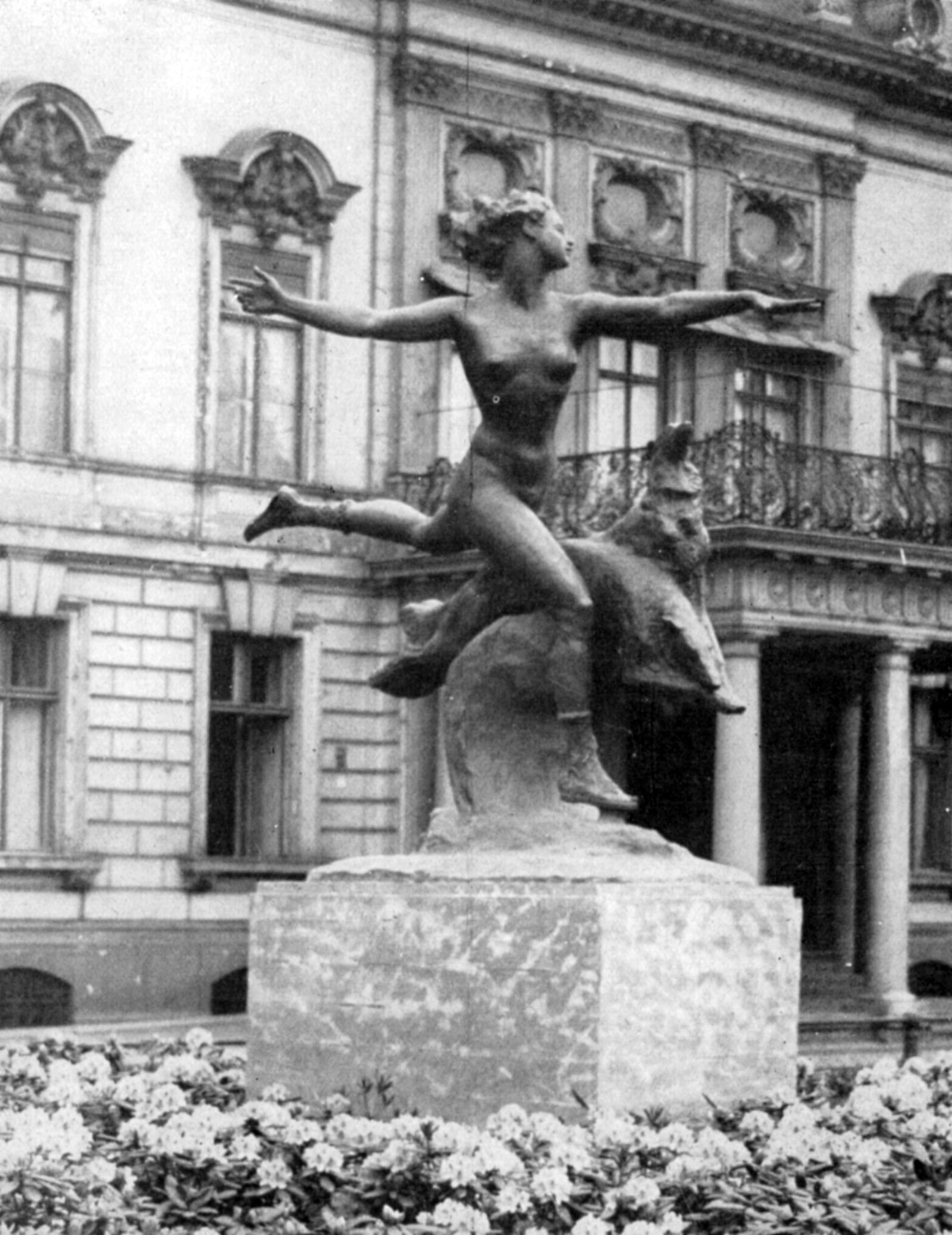 Skulptur Jagende Nymphe von Walter Schott auf dem Pariser Platz vor der Französischen Botschaft in Berlin-Mitte.